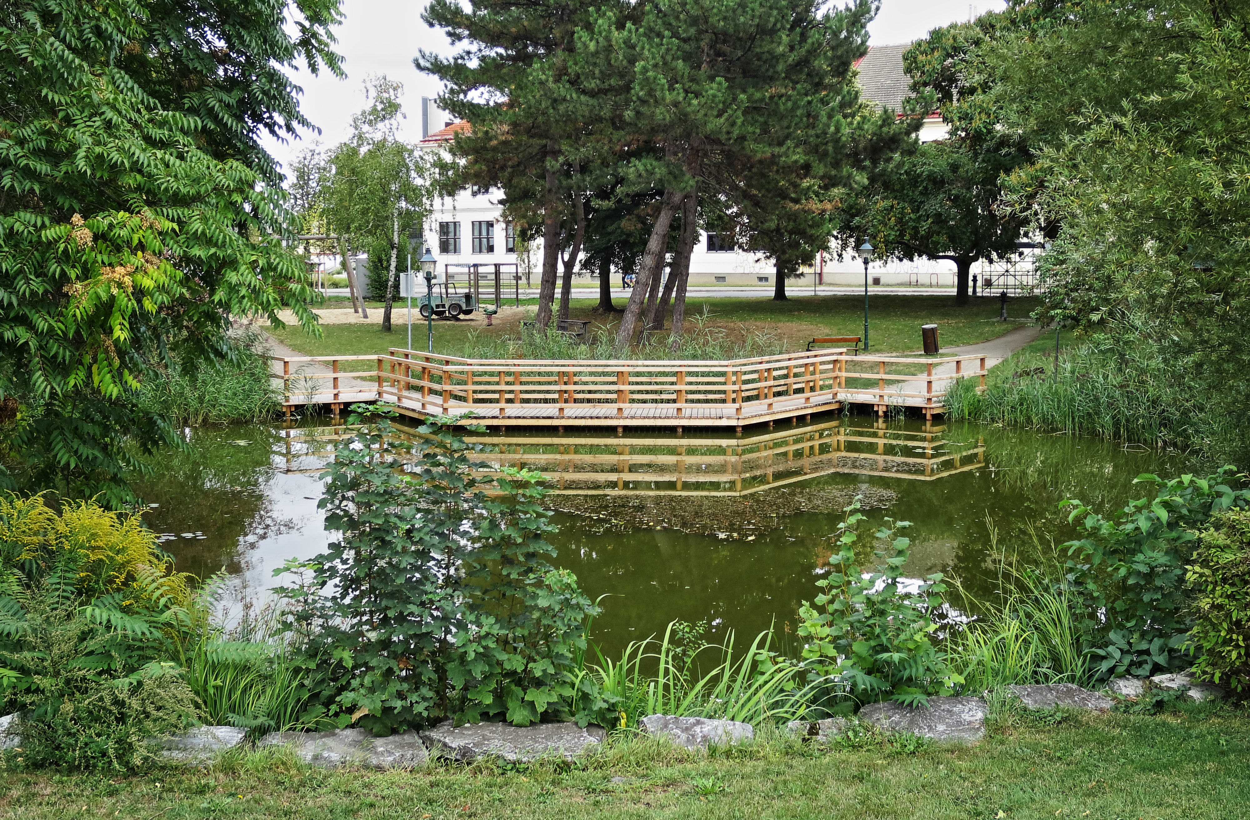 Bill-Grah-Park in Wien-Donaustadt, Teich